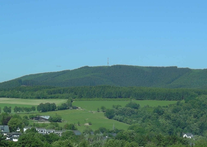 Beerenberg (Sauerland) bei Schmallenberg, Germany.